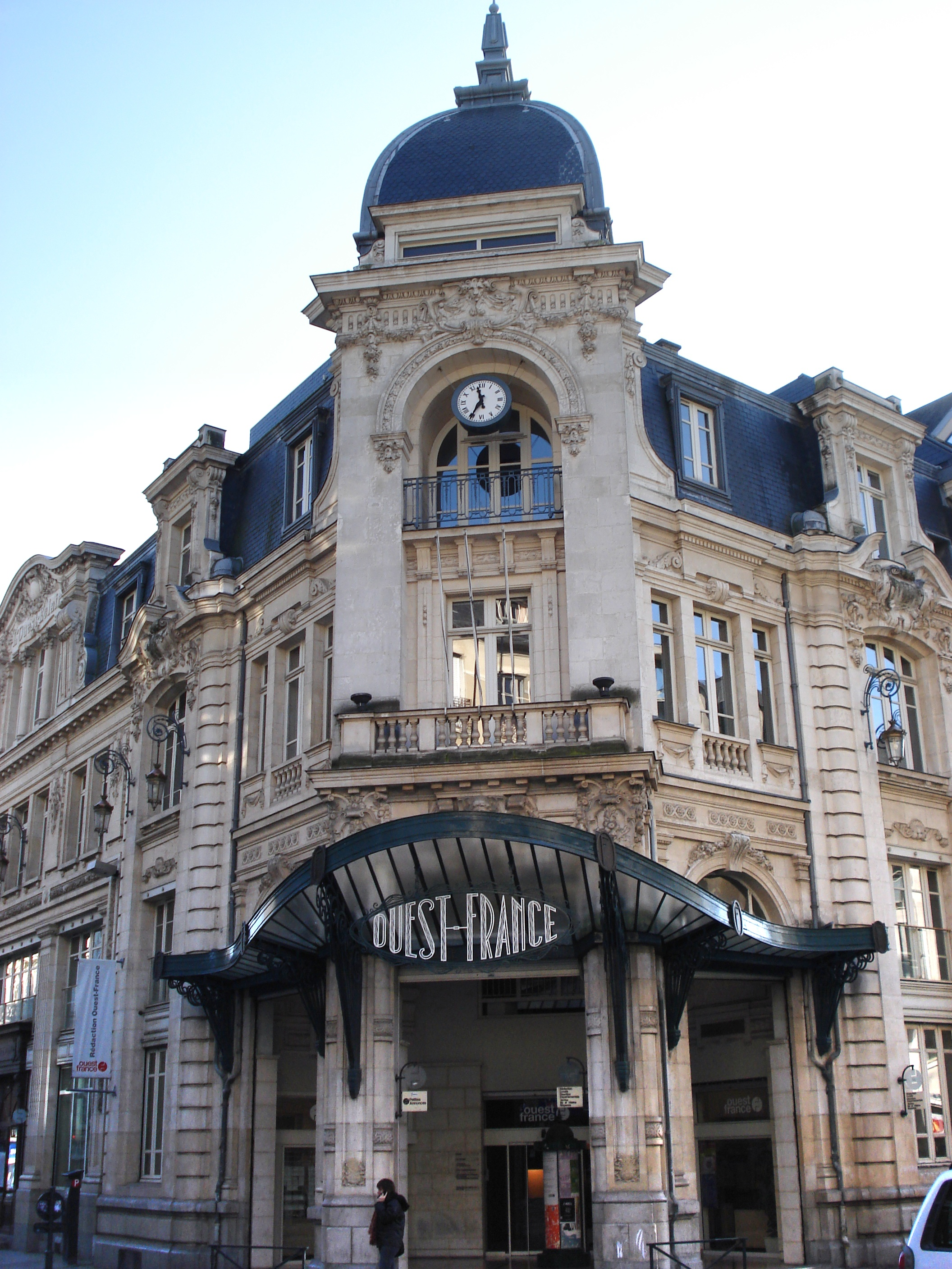 Photographie libre de l'ancien siège social et de la rédaction locale de Rennes du journal français Ouest France (aujourd'hui transformé en hôtel 3 étoiles). .